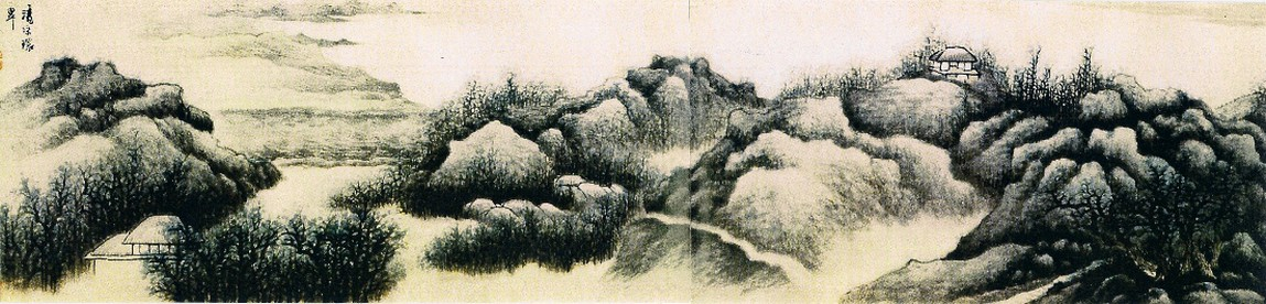 Vue de la Montagne Froide, du peintre chinois Gong Xian, (actif env. 1660-1700), rouleau portatif, encre et couleur sur papier, 30,2 x 144,2 cm. Musée du palais impérial. Beijing.